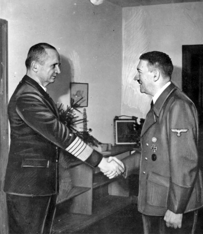 Karl Dönitz, Adolf Hitler Zentralbild 1945 Adolf Hitler empfängt den Oberbefehlshaber der Kriegsmarine, Großadmiral Karl Dönitz, im "Führerbunker". Kurz vor dem militärischen und politischen Zusammenbruch Deutschlands und seinem Selbstmord übertrug Hitler dem Großadmiral die Leitung des Deutschen Staates. Abgebildete Personen: Dönitz, Karl: Großadmiral, Ritterkreuz (RK), Marine, Oberbefehlshaber der Kriegsmarine, Deutschland (PND 118526251) Hitler, Adolf: Reichskanzler, Deutschland Information added by Wikimedia users. (Englisch:) Main image 1945 Adolf Hitler receives the commander of the Navy, Grand Admiral Karl Dönitz, in the "Führerbunker". Shortly before the military and political collapse of Germany and his suicide, Hitler transferred the leadership of the German state to the Admiral.